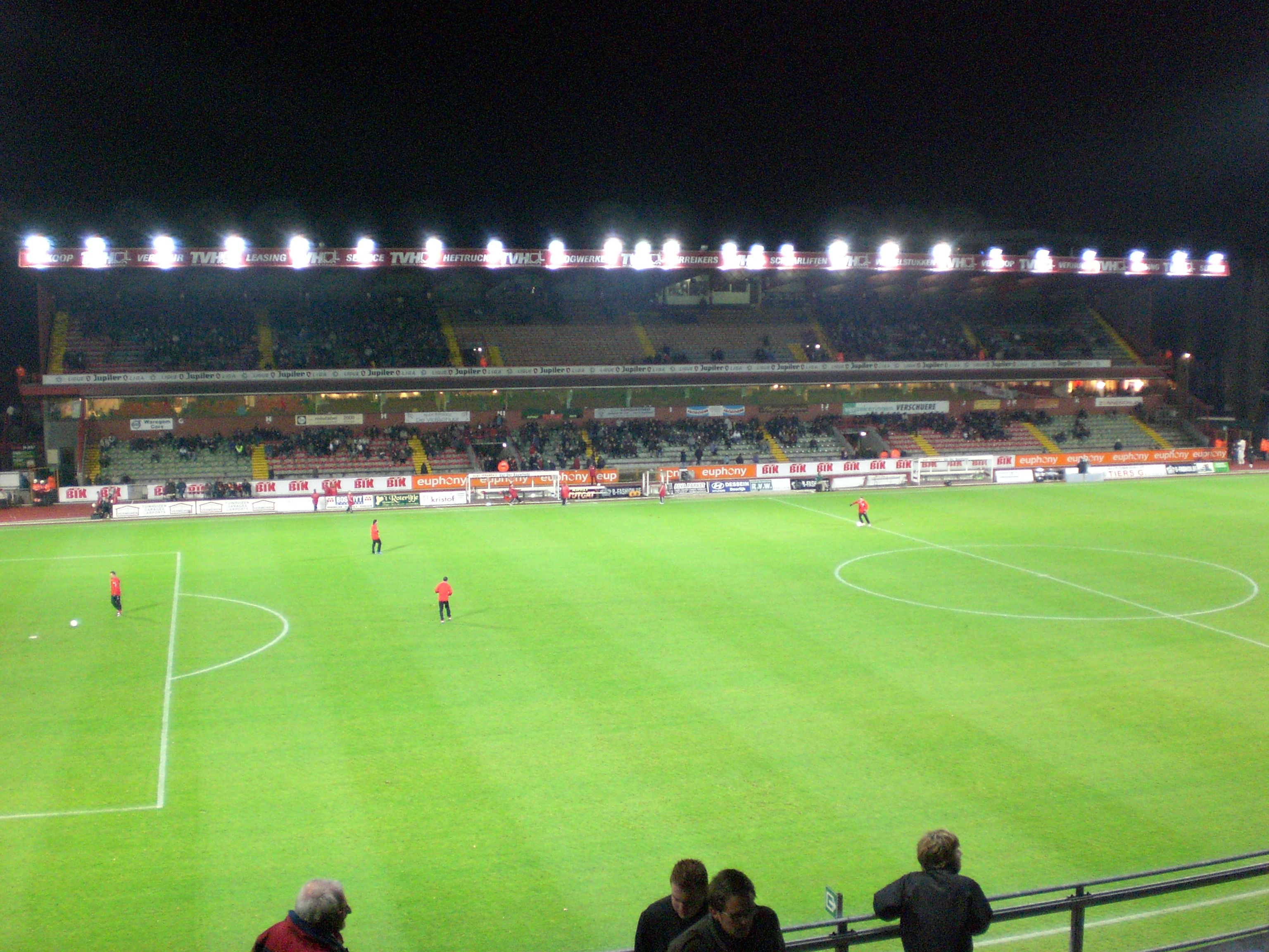 Het Regenboogstadion